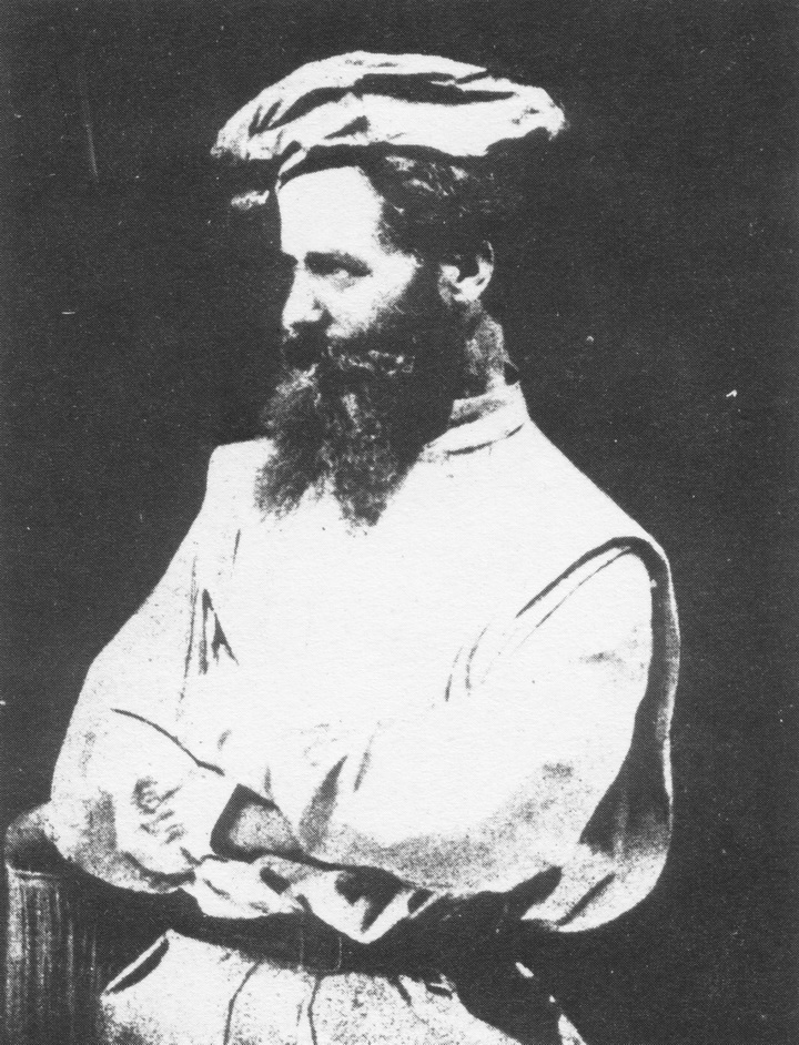 Fotografia di Giulio Monteverde